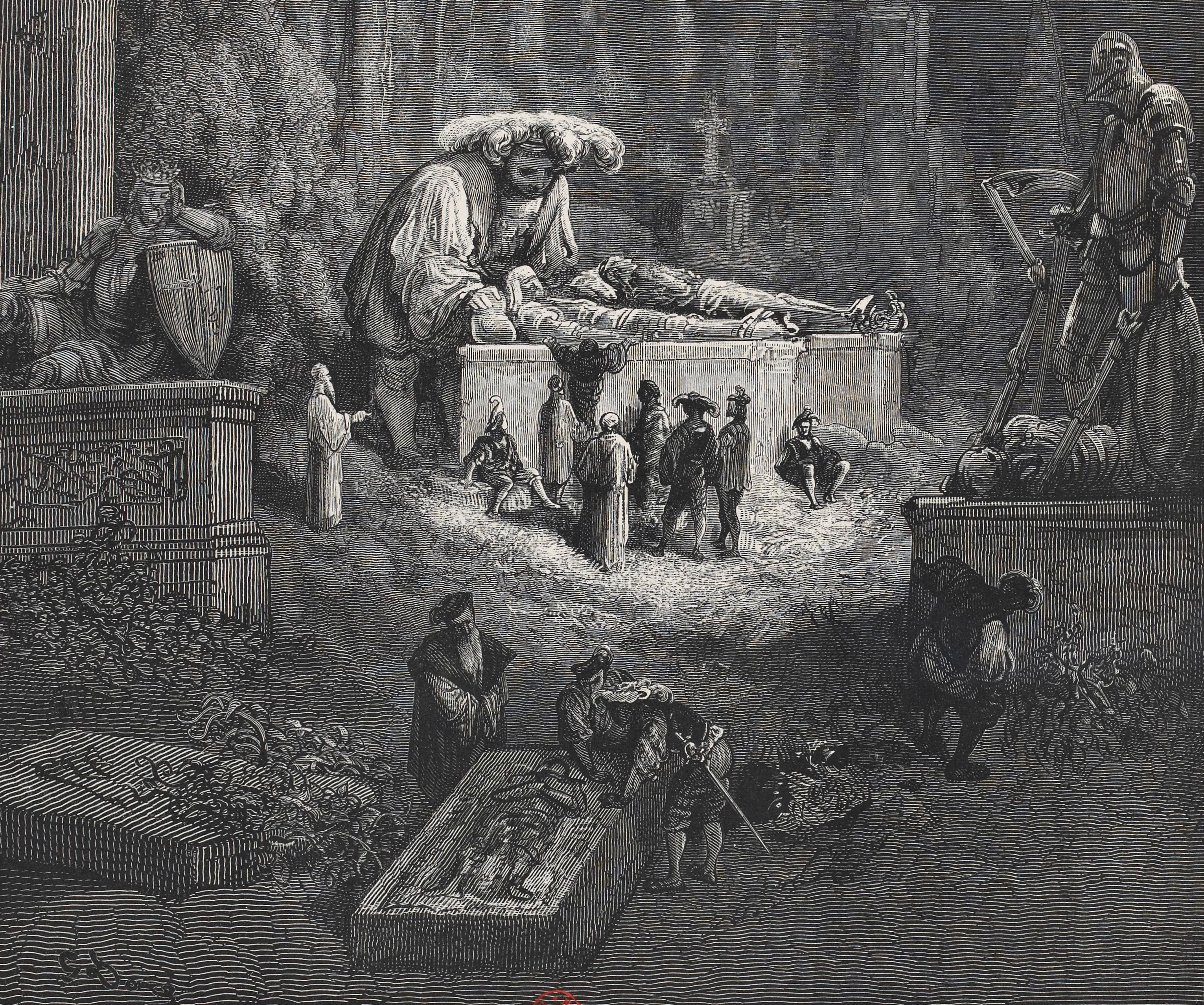 Illustrations du Quart Livre de Gustave Doré en 1873, éditions Garnier Frères